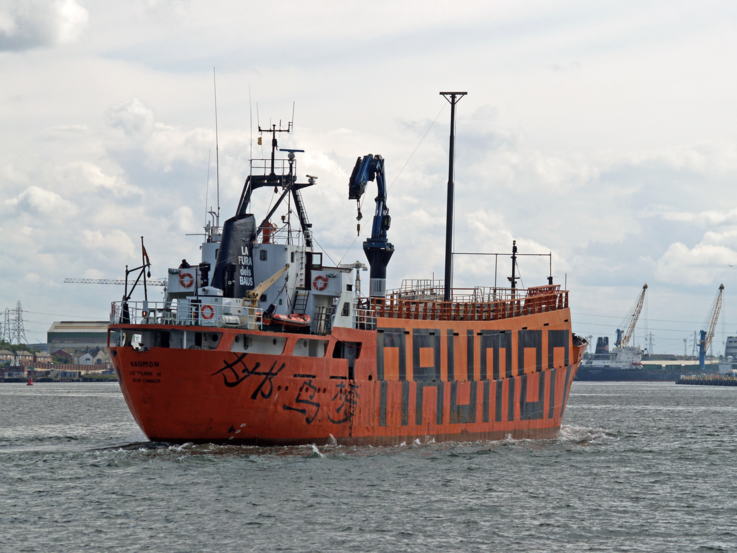 Naumon, Barco Carguero Cultural de Carlus Padrissa, uno de los seis directores artísticos de La Fura dels Baus